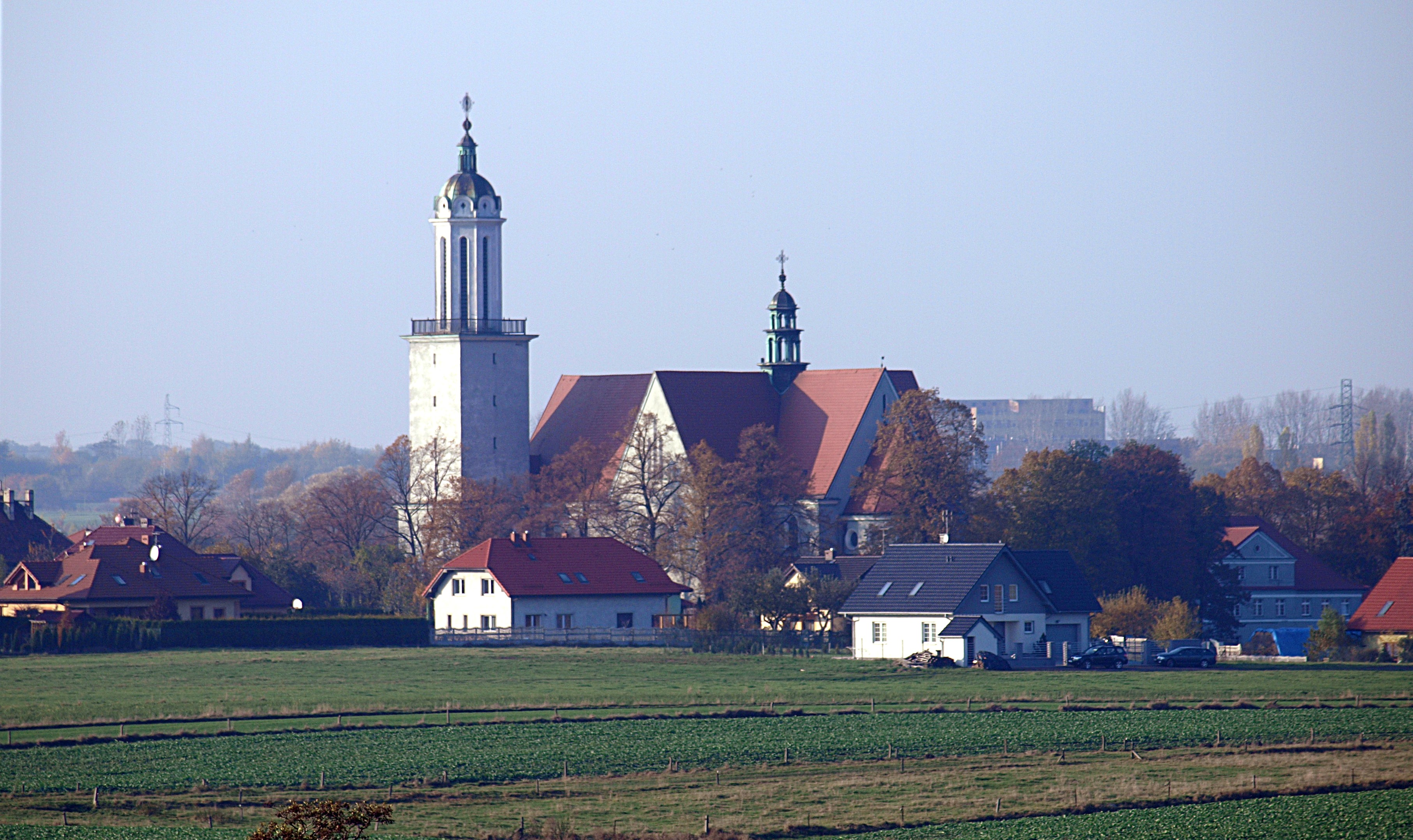 Kościół św. Antoniego widziany z Sikornika.